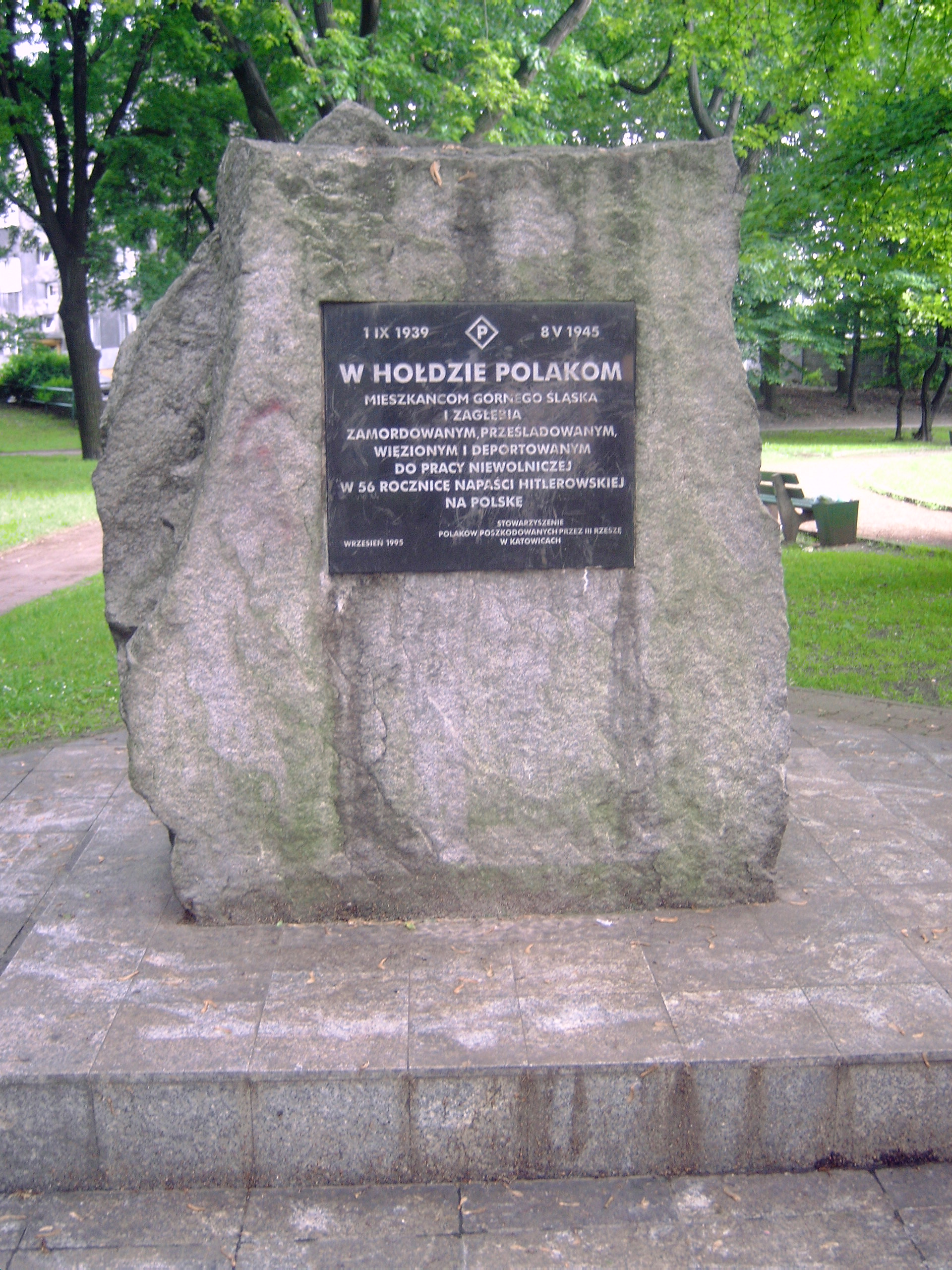 Tablica pamiątkowa na placu Józefa Londzina w Katowicach